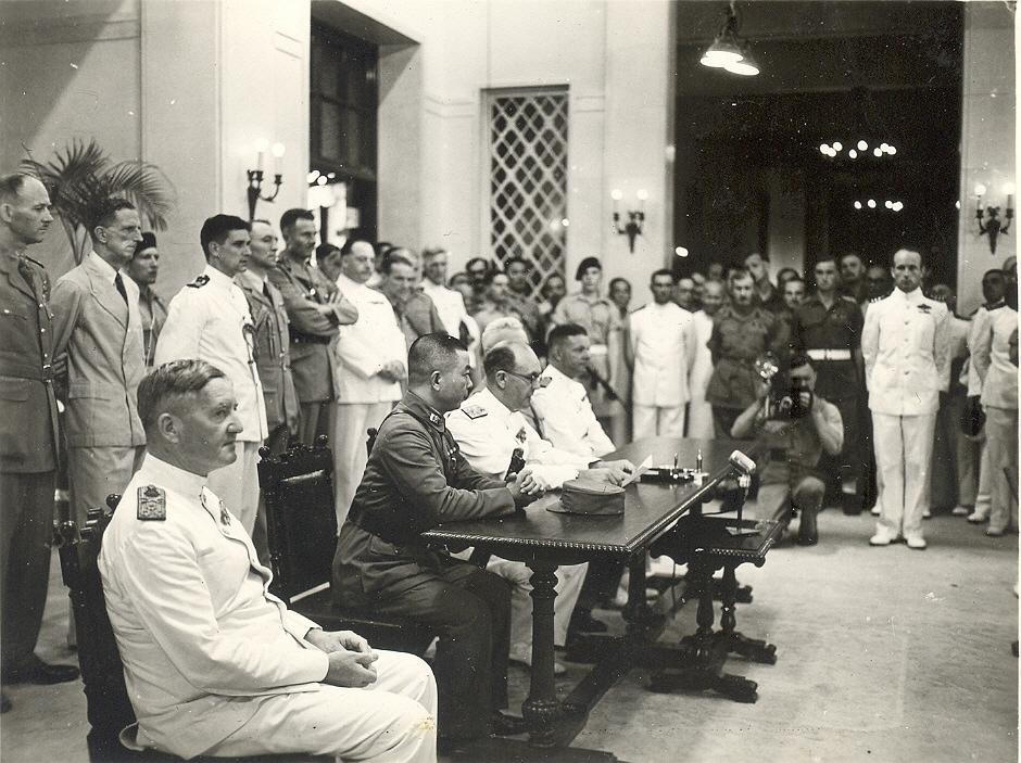 中文（香港）: 夏慤（前排坐下左三）於督憲府主持受降儀式，另外列席代表還包括中方的潘華國少將（前排坐下左二）、美方代表（前排坐下左四）與加拿大代表（前排坐下左五）。